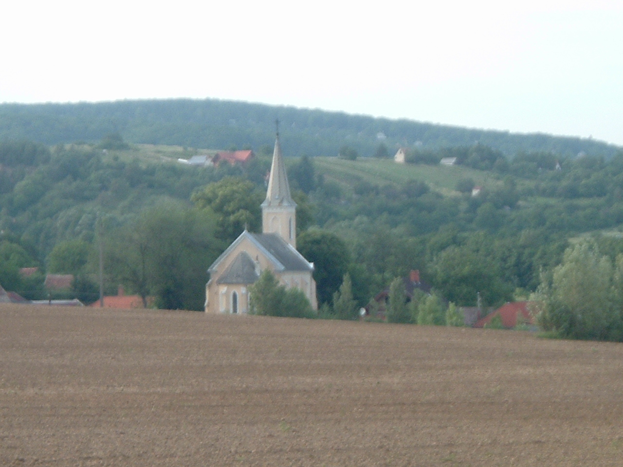 Cák, Szent Péter és Pál apostolok római katolikus templom